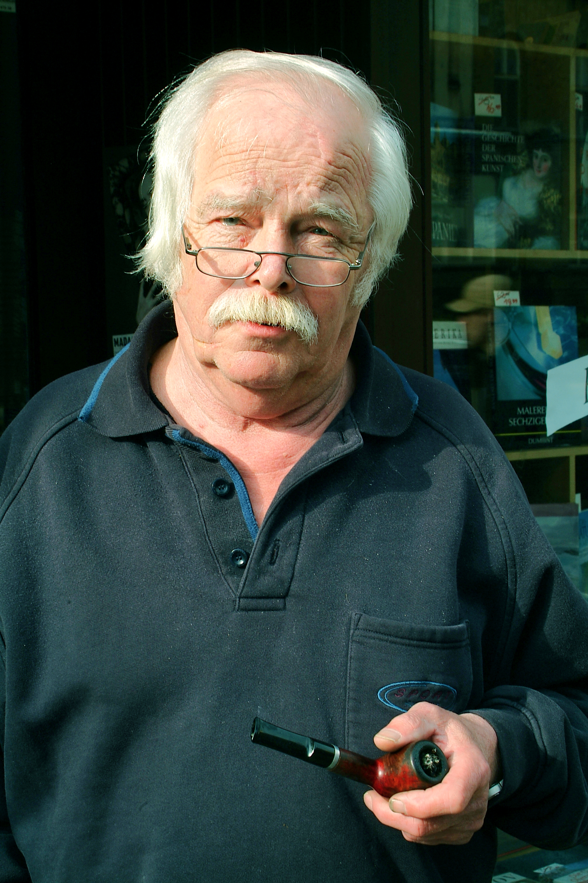 Otto Stender mit Pfeife vor der Buchhandlung Stender, Marienstraße 77 in Hannover-Südstadt.